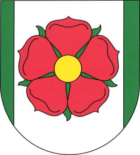 znak, Hořice na Šumavě, okres Český Krumlov